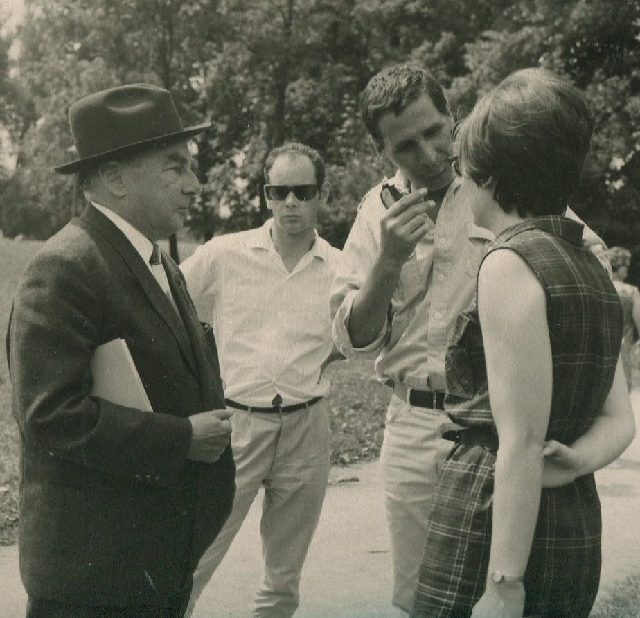 Erich Kästner bei Dreharbeiten im Englischen Garten in München mit Kameramann Peter Schneider (Mitte) und Regisseur Georg Armin für das Feature "Die heile Welt/Jugendbücher zwischen Märchen und Wirklichkeit" für das Dritte Programm des NDR-Fernsehens. Kästners letztes Fernsehinterview, er war schon sehr krank